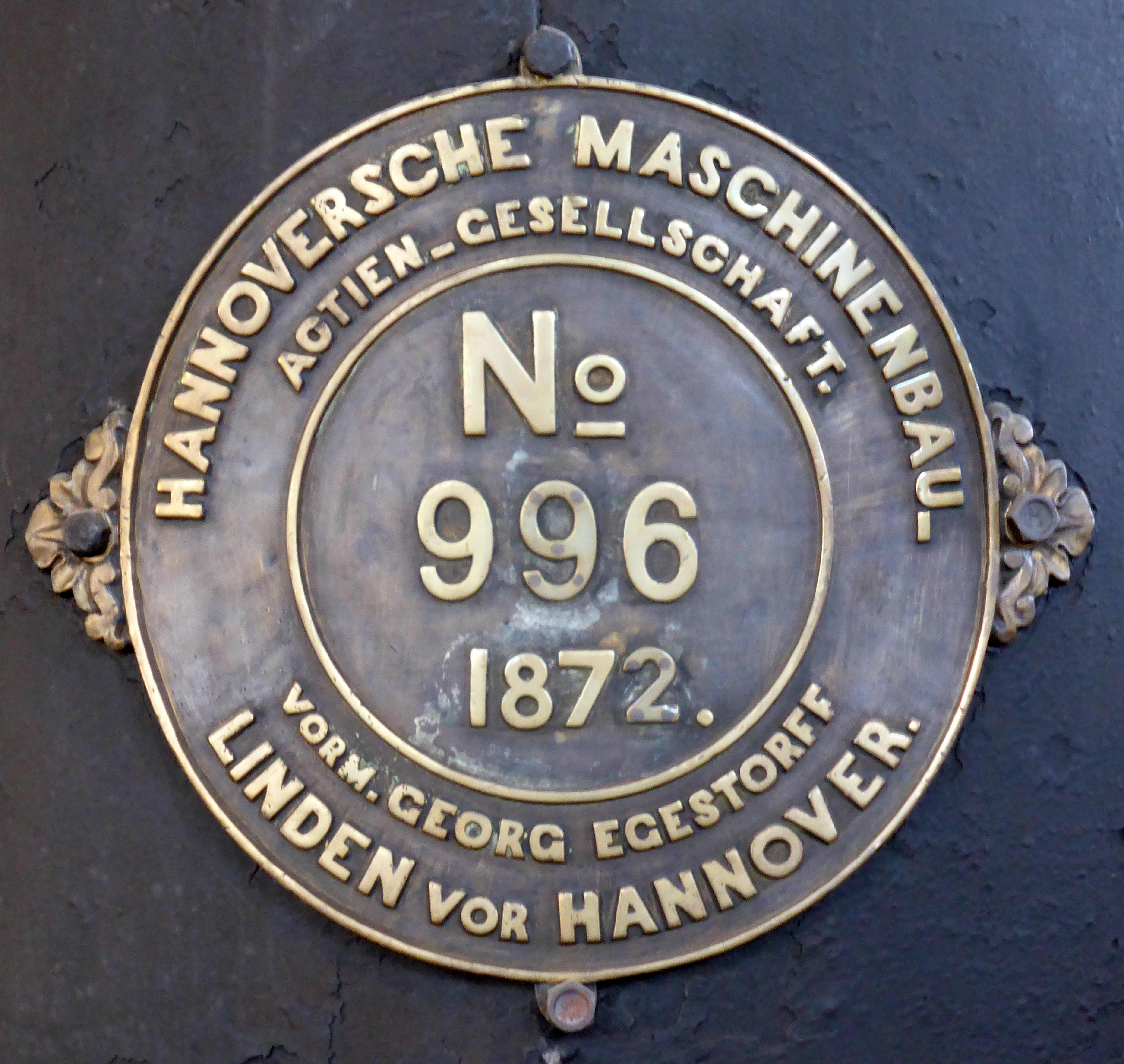 Typenschild Hannoversche Maschinenbau Actien-Gesellschaft. Ausgestellt im Deutschen Technikmuseum in Berlin. Wikipedianische KulTour am 10. Oktober 2015 in der Ausstellung des Museums.